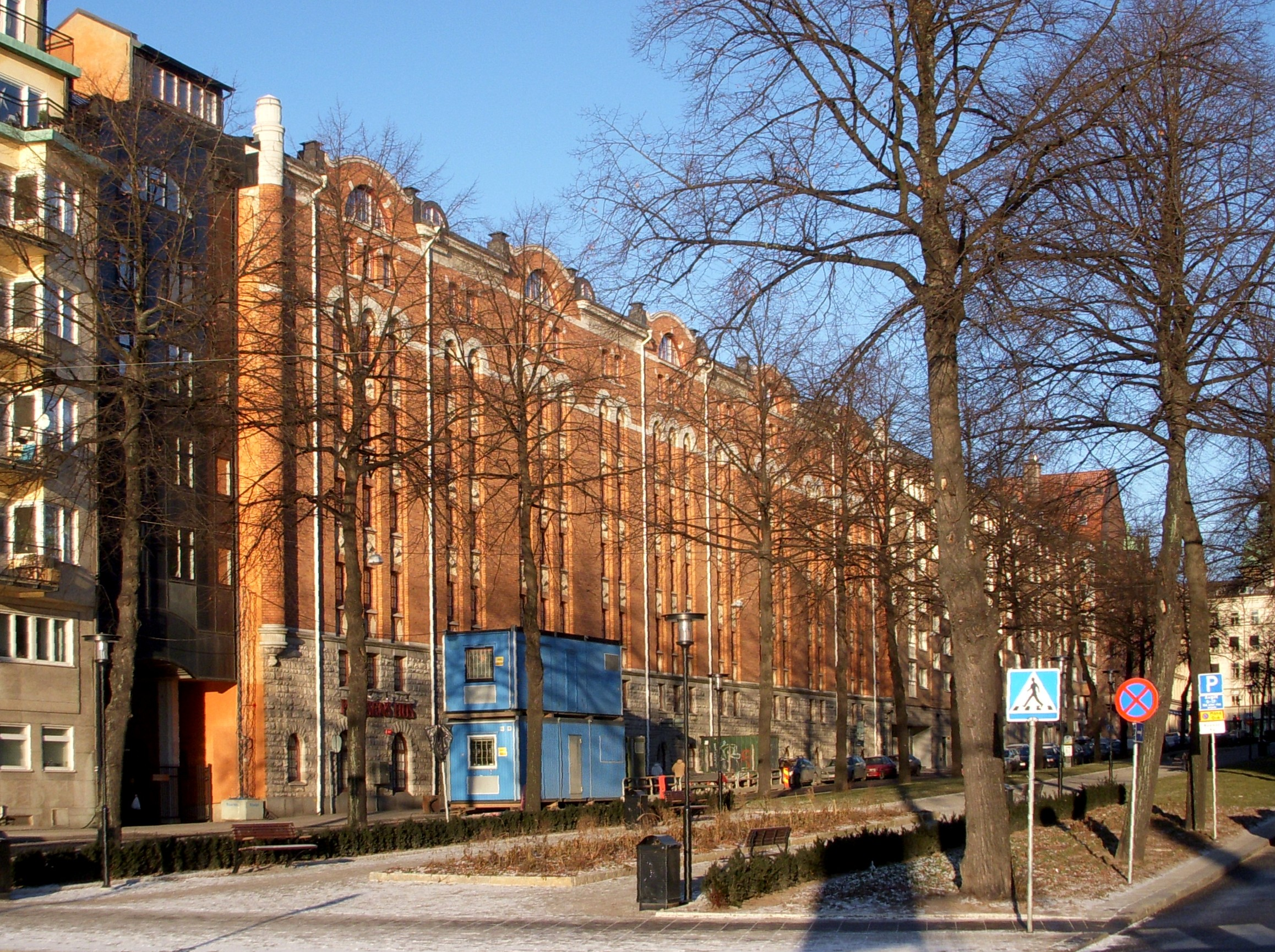 "S:t Eriks bryggeri:s" gamla byggnad på Kungsholmen i Stockholm januari 2009